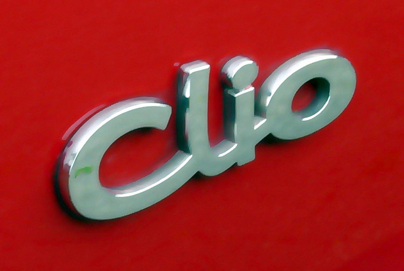 Type aanduiding van de Renault Clio